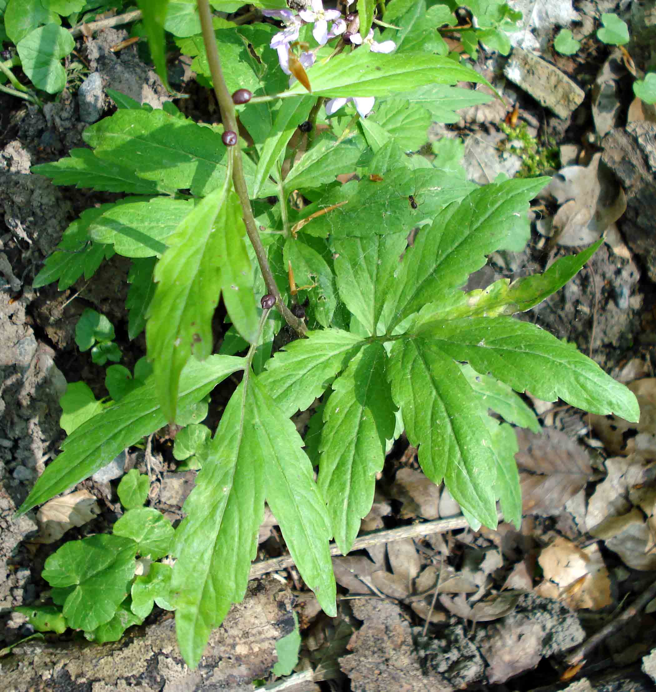 Cardamine bulbifera (Unterfranken, Germany)